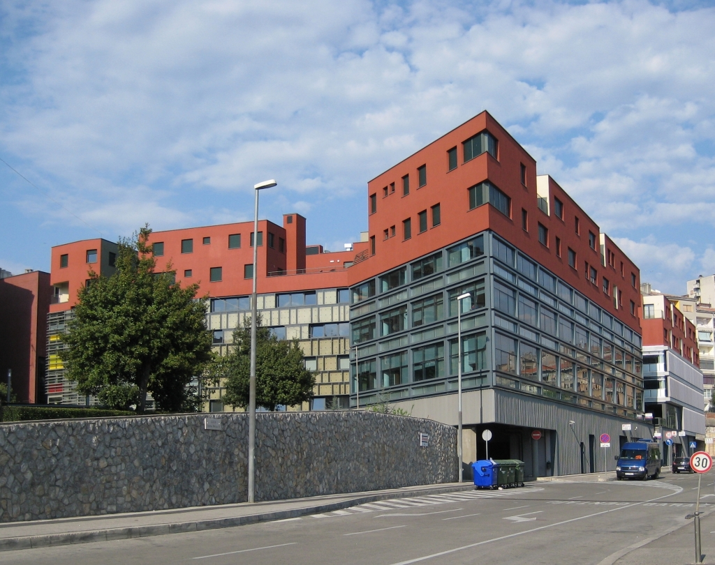 Zgrada centra Zagrad u Rijeci.